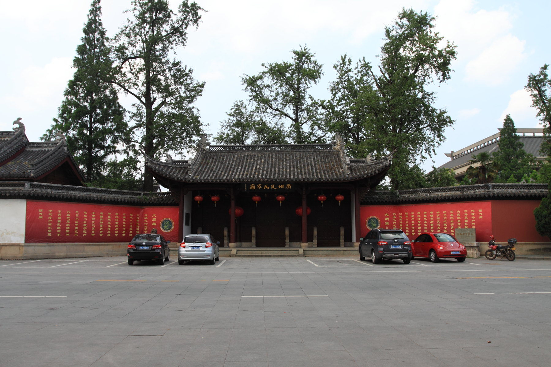 孔氏南宗家庙大门，位于浙江省衢州市，全国重点文物保护单位。“衢州孔氏家庙”匾额为沙孟海手书。